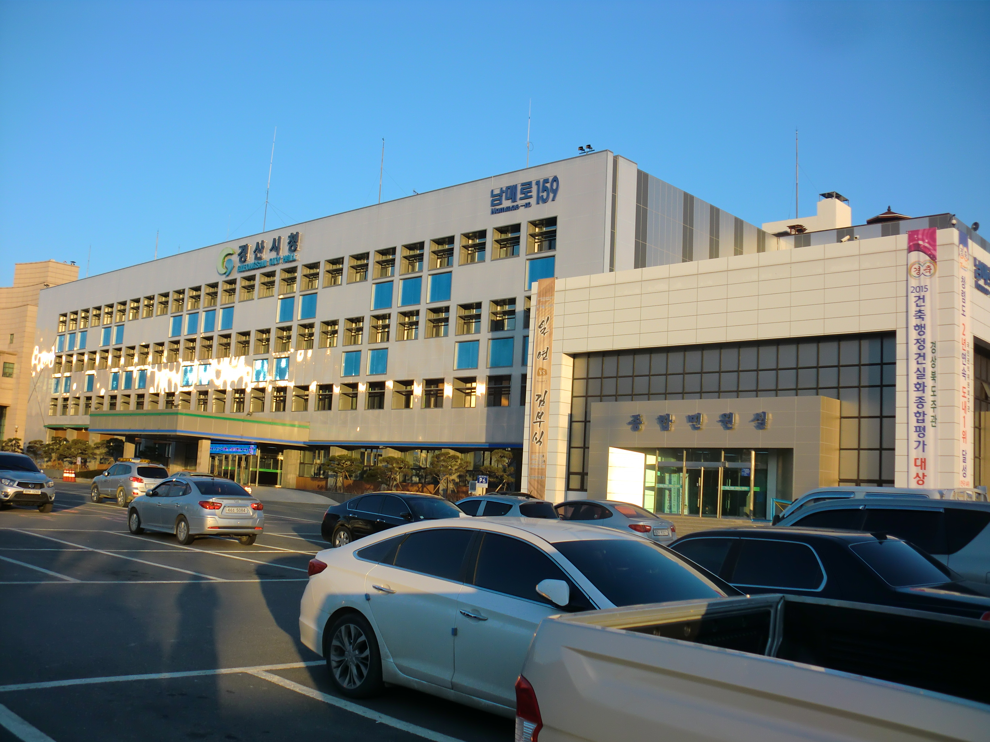 경상북도 경산시에 있는 경산시청